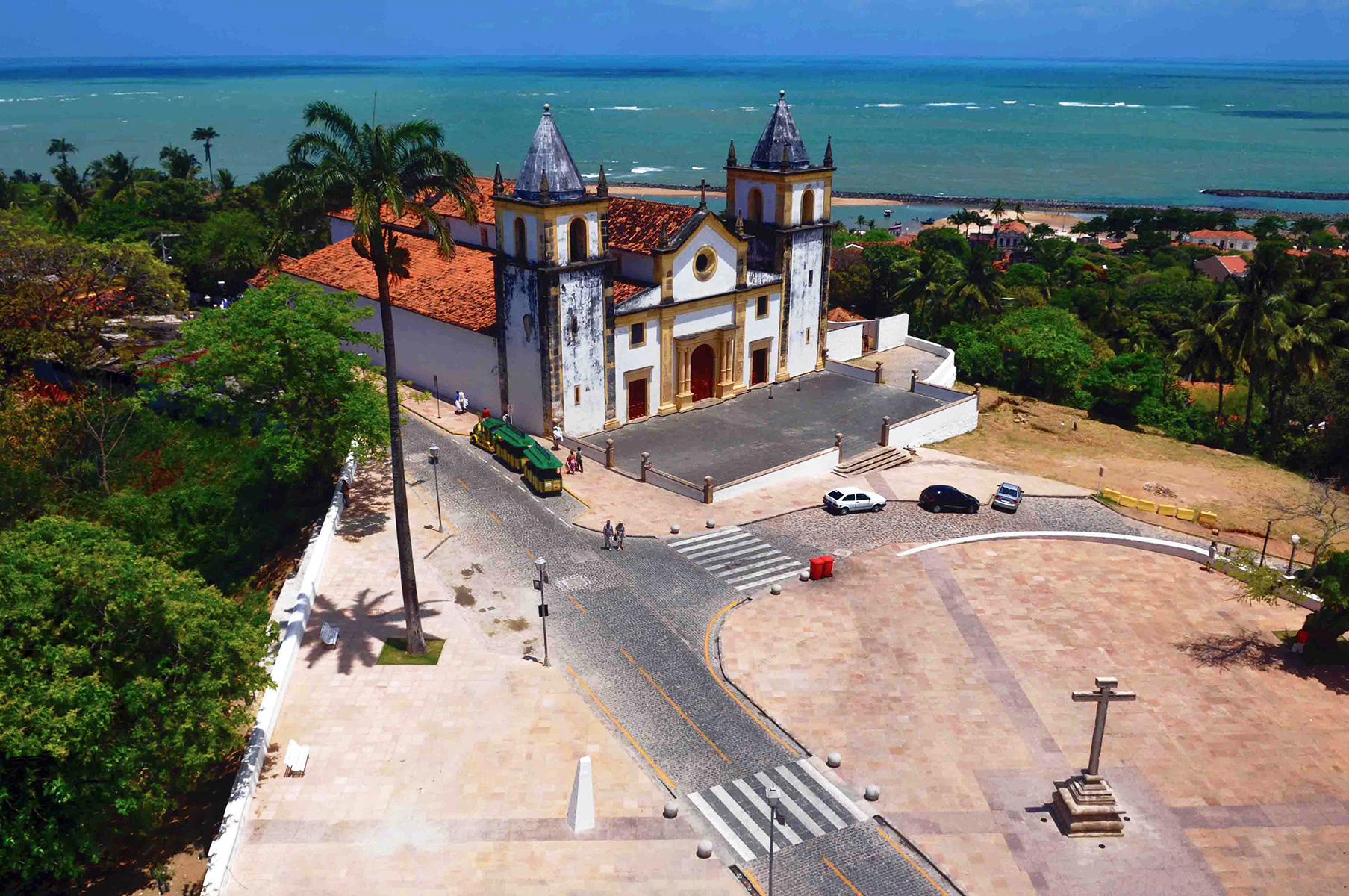 Igreja de São Salvador do Mundo (Igreja da Sé) Inicialmente uma pequena capela de taipa, erguida pelo donatário de Pernambuco, Duarte Coelho, que via no alto da colina uma possibilidade de proteção contra os inimigos. Foi levantada sob a invocação de Nosso Senhor Salvador do Mundo e, em 1548, deu-se início a construção da nova Igreja Matriz, sofrendo em 1584 sua primeira reforma. Durante a invasão holandesa, serviu como templo calvinista e sua estrutura sofreu bastante com o incêndio ateado pelo invasor. Foi reconstruída na Restauração Pernambucana em 1669, em estilo gótico, e em 1676, elevada à categoria de Catedral, já que Olinda, neste período, passava de vila para cidade. O prédio passou por várias reformas (neogótica em 1911, eclética em 1939) e, em 1983, foi concluída a mais recente restauração. Sua atual fachada é em estilo colonial maneirista. Possui três portas em madeira ladeadas por colunas jônicas, formando com seu frontispício e suas torres um belo conjunto arquitetônico. A segunda torre foi construída em 1713, condição para elevá-la ao status de Catedral. No seu interior, duas ricas capelas laterais em estilo barroco com entalhe e douramento, muito rica em arquitetura e trabalhos artísticos, e possui grandes colunas em pedra. O forro do teto é em madeira abaulada, alto e imponente, além de existirem belos quadros pintados a óleo, talhas em madeira e pedras e móveis em jacarandá. No local encontra-se o túmulo do arcebispo emérito de Recife e Olinda, Dom Hélder Câmara.